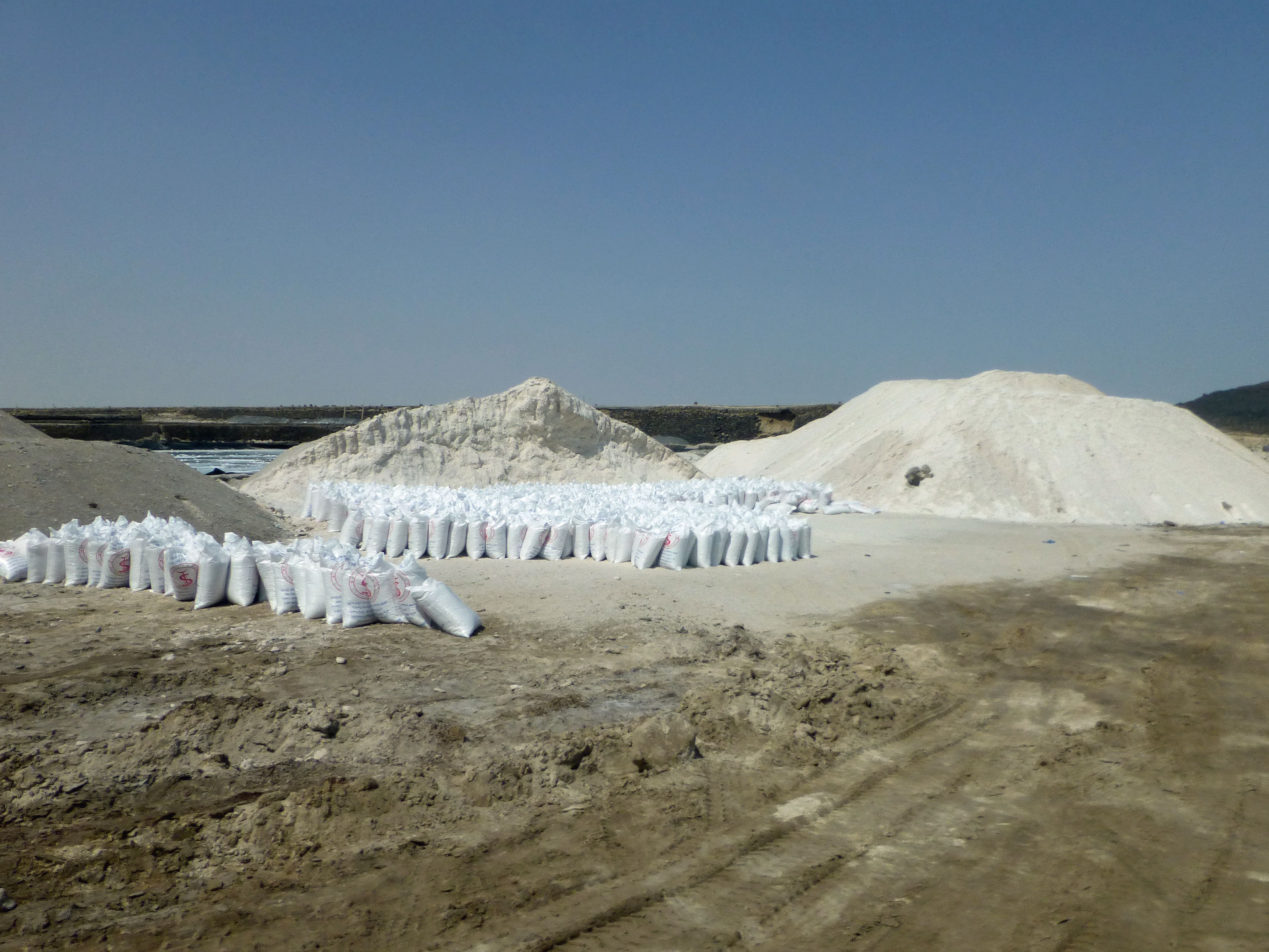 Lac salé Afdera (ou Afrera) au nord de l'Ethiopie (Région Afar). Exploitation du sel